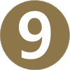 علامت خط مترو در شهر سئول، جمهوری کره